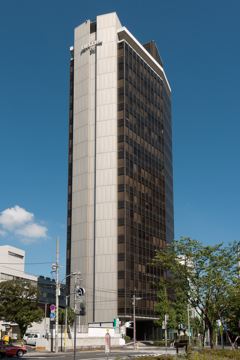 富士フィルム本社ビル、東京都港区西麻布。